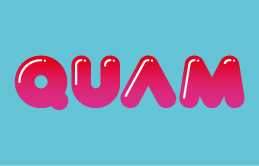 Logo de Quam